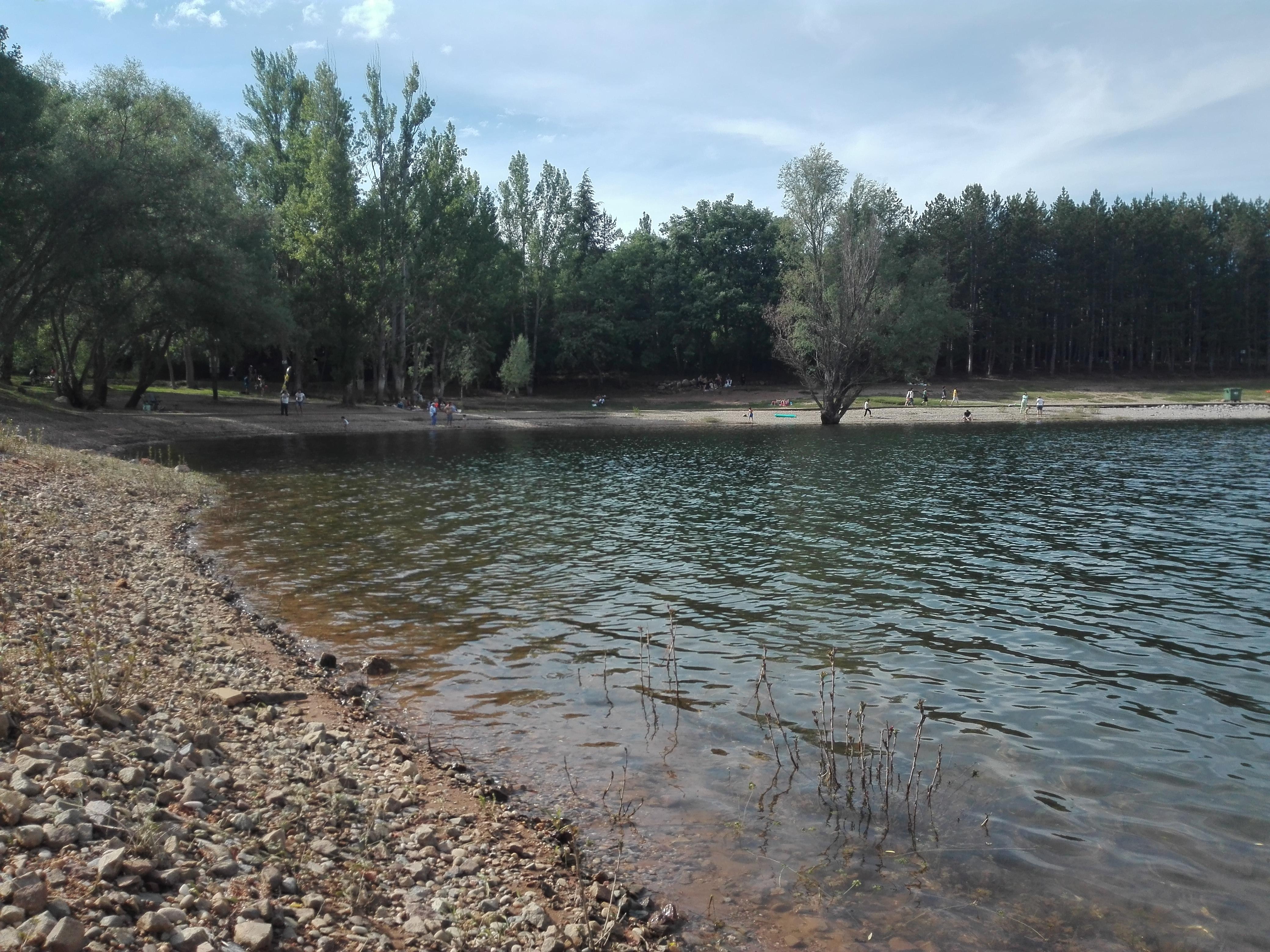 Pantano de El Rasillo